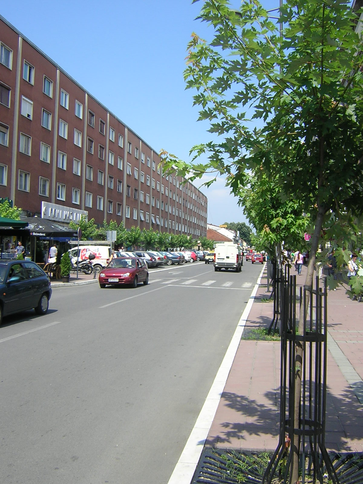 Ulica Miloša Velikog u Kraljevu